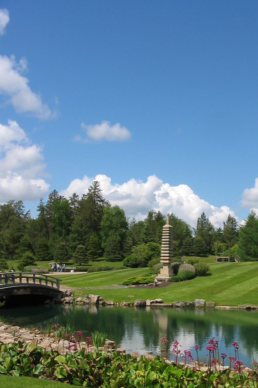 Japanese Garden of Devonian Botanical Garden.